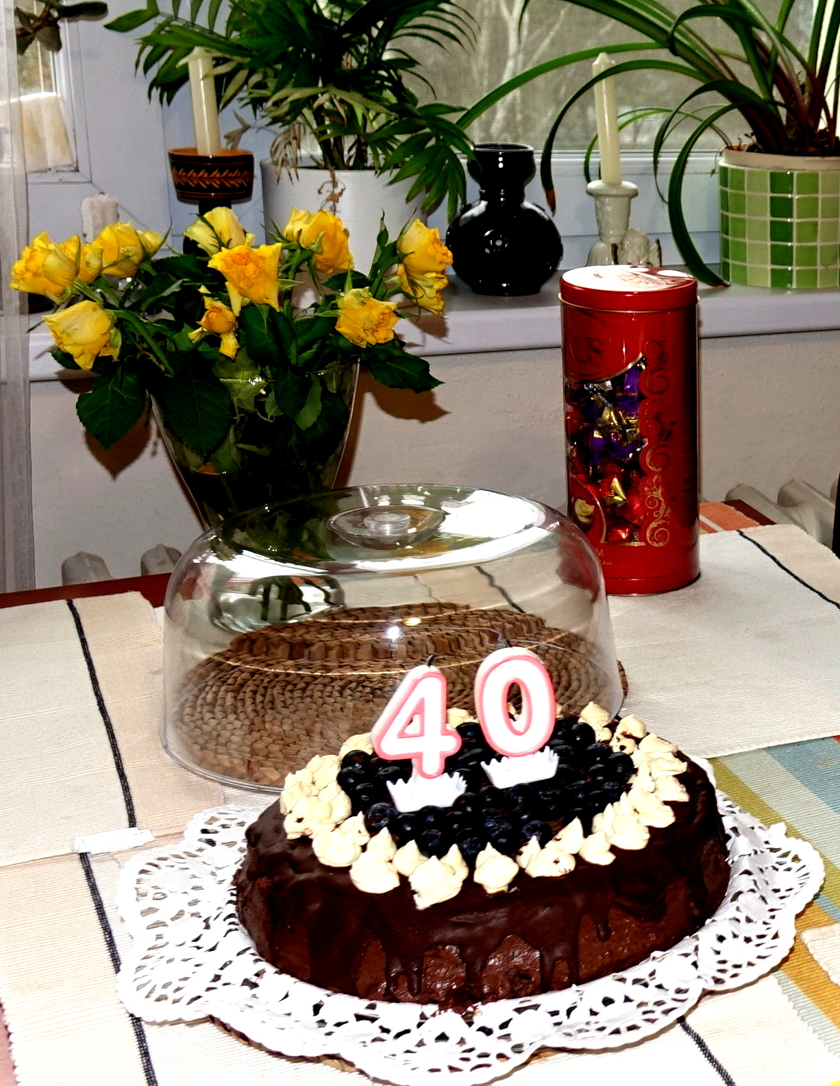 Jar 2019. Domáca čokoládová torta s čučoriedkami a darčeky k maličkej oslave 40. narodenín. Slovensko.